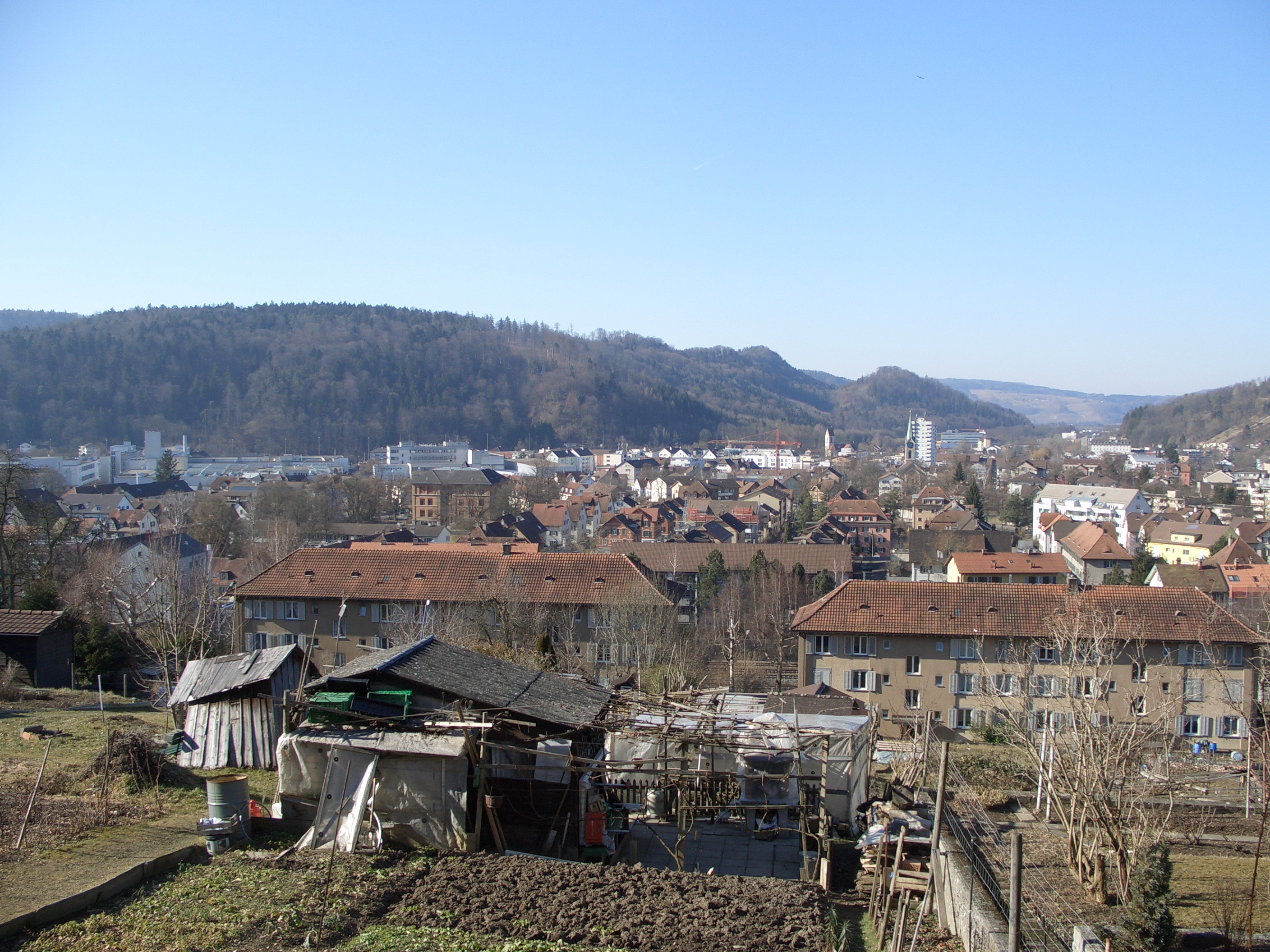 Der Stadtteil Töss, im Vordergrund das Quartier Eichliacker und im Hintergrund das Quartier Schlosstal.